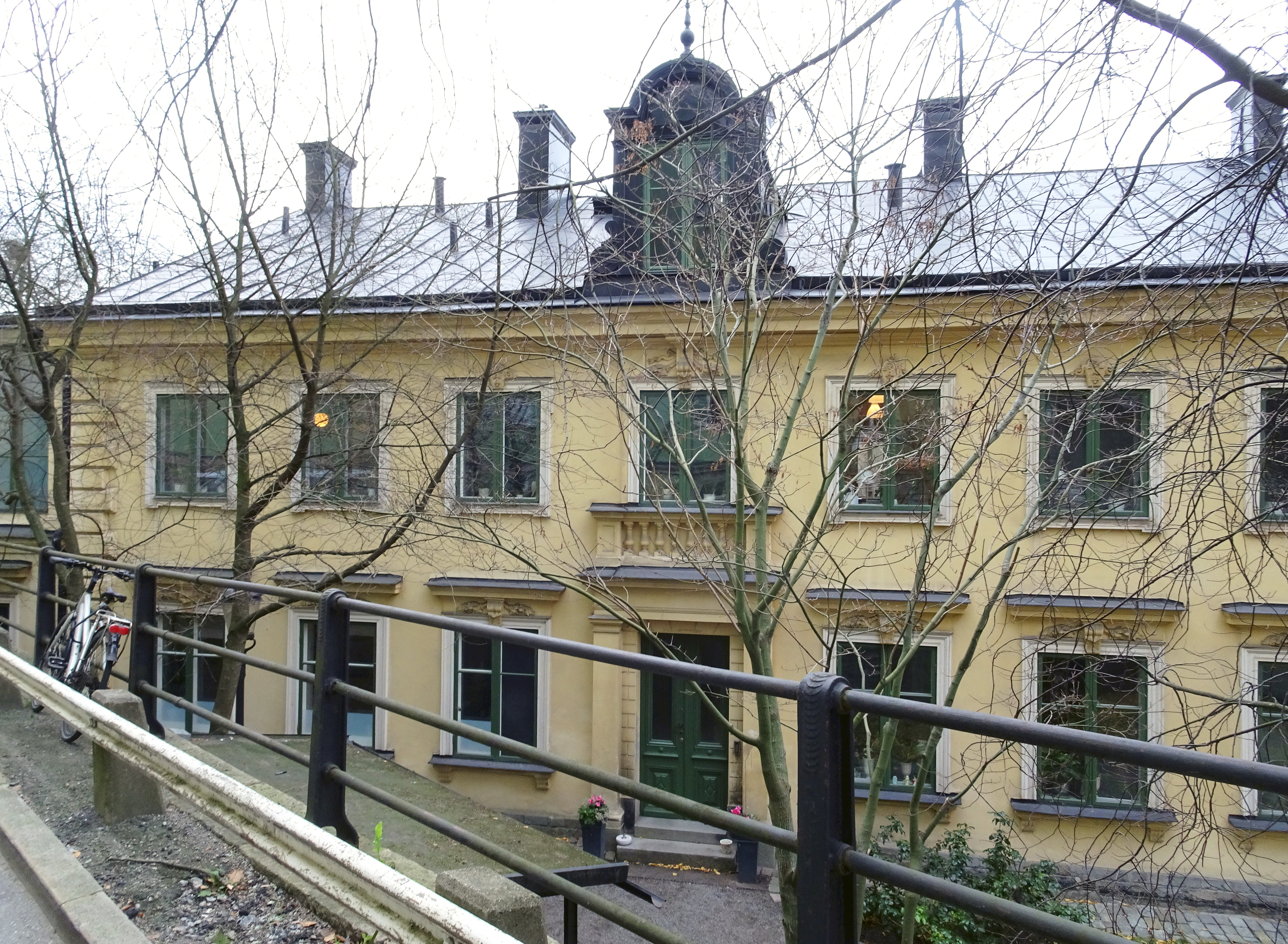 Heleneborgs malmgård på Södermalm, Stockholm (fasad mot söder)